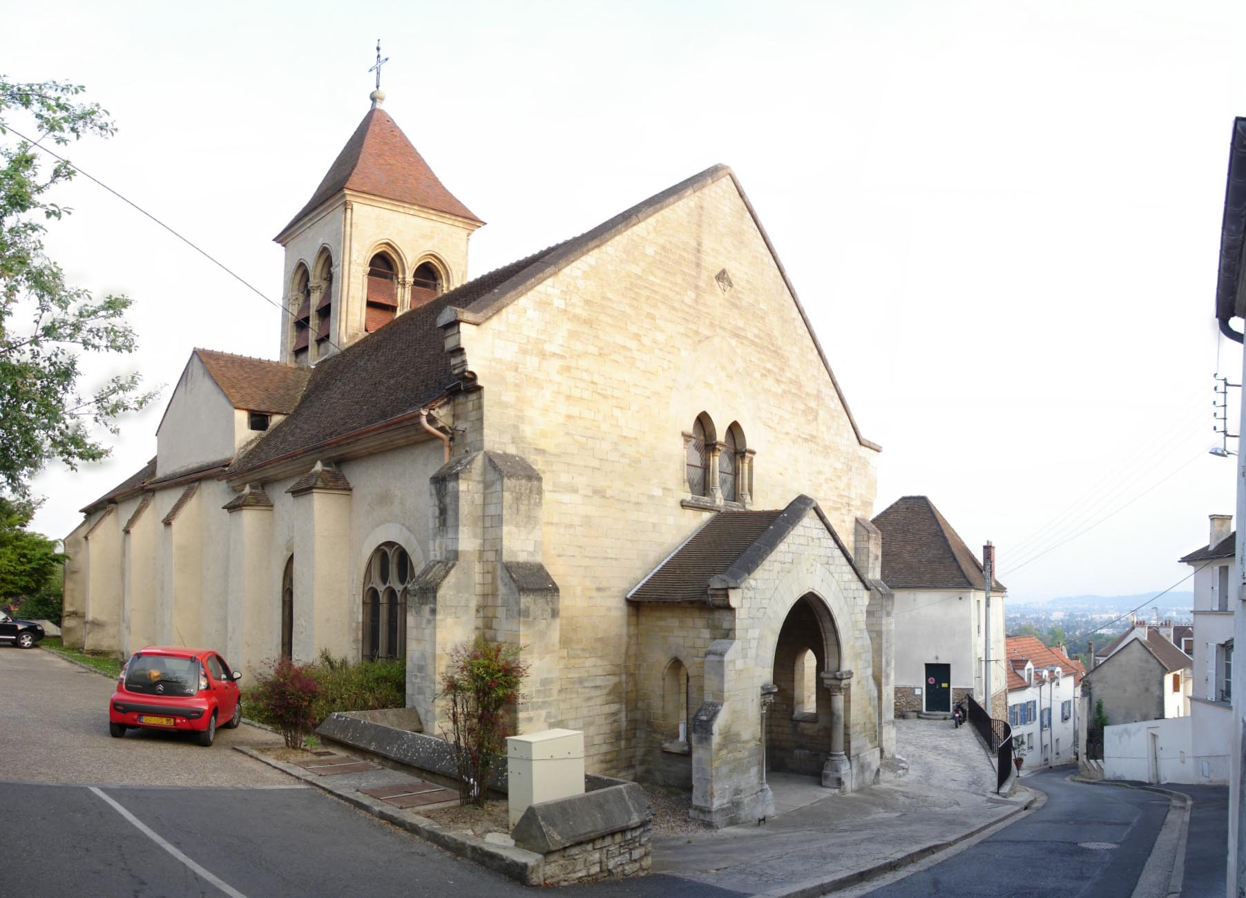 Eglise de Saint-Prix (Val-d'Oise), France